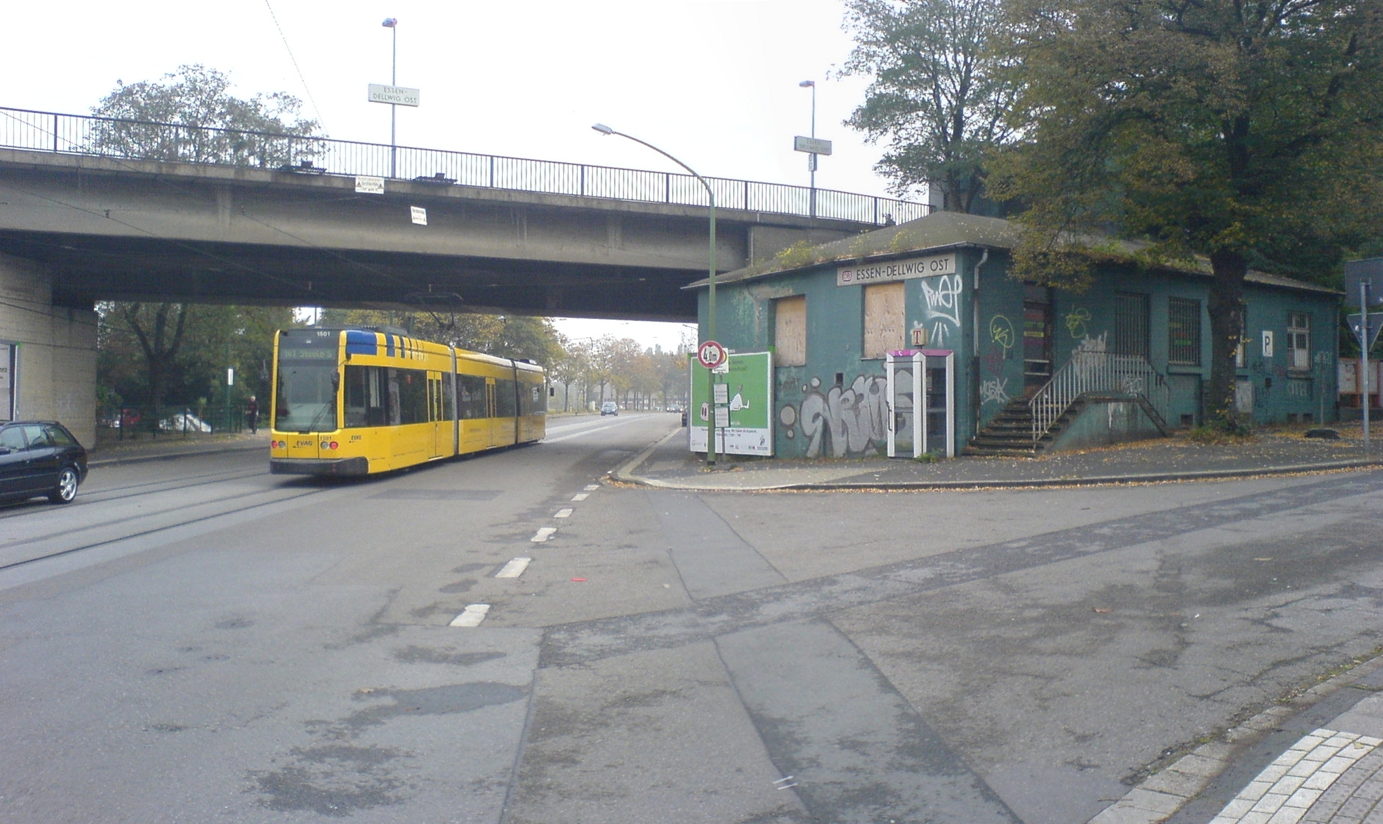 Bahnhof Essen-Dellwig Ost